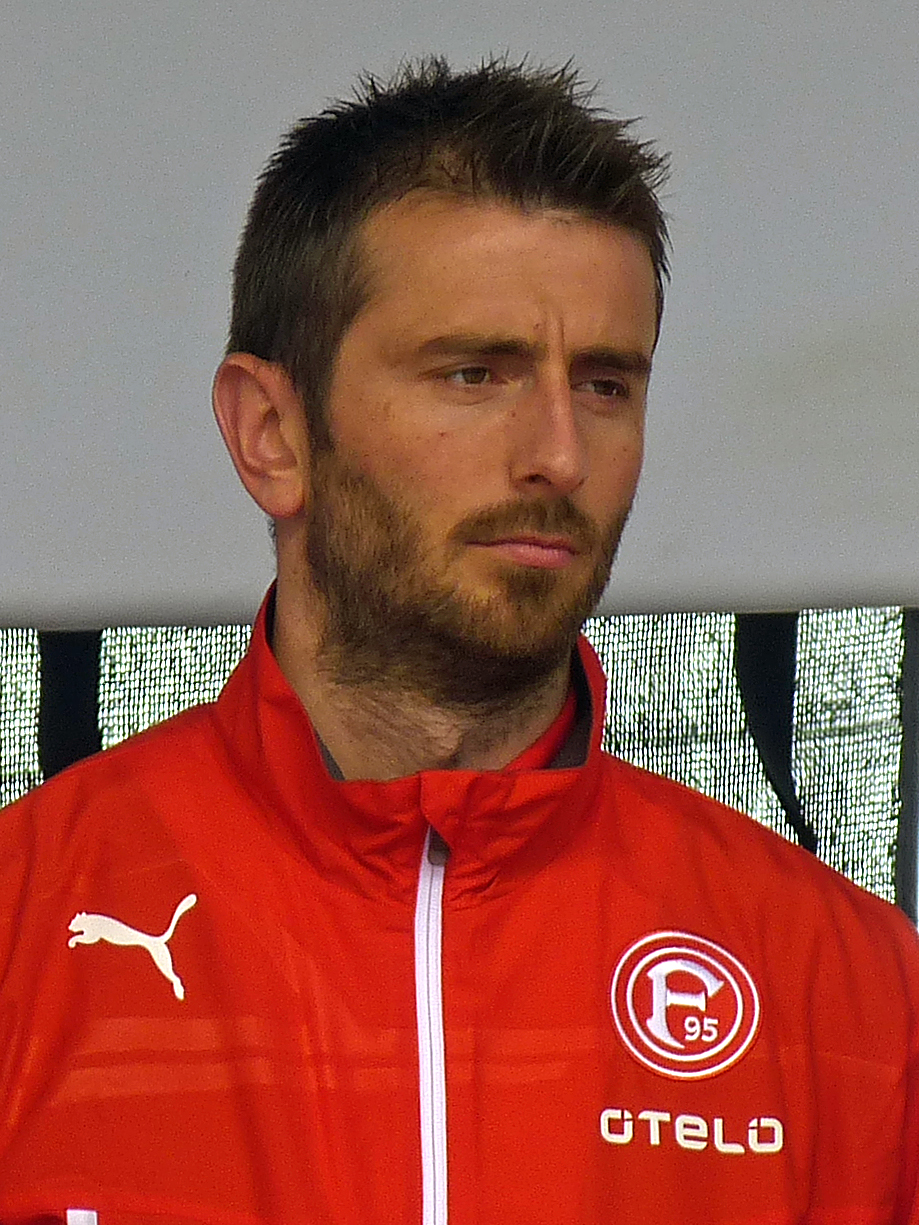 Stelios Malezas, griechischer Fußballspieler